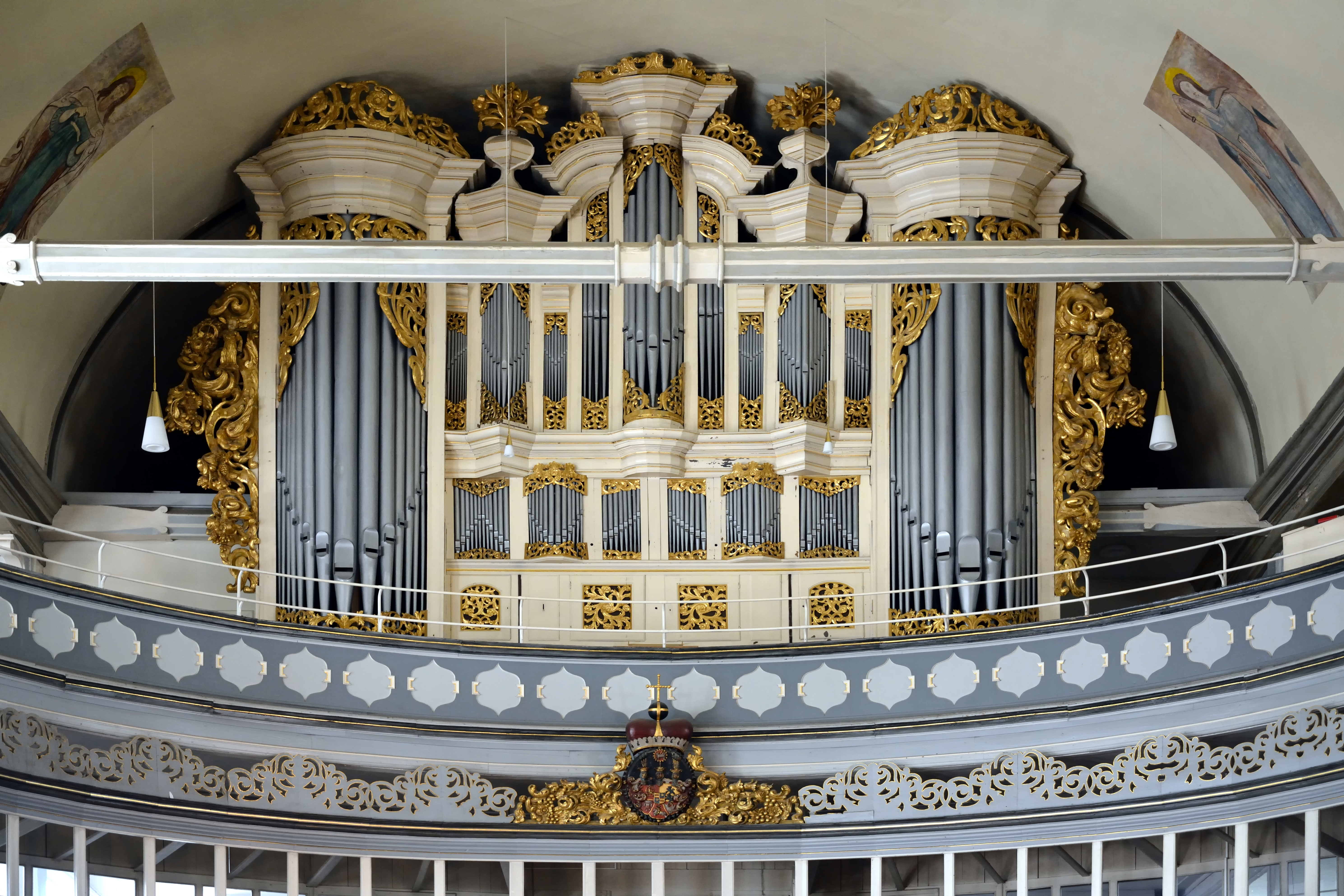 Impressionen aus dem Inneren der Stadtkirche St. Laurentii in Itzehoe